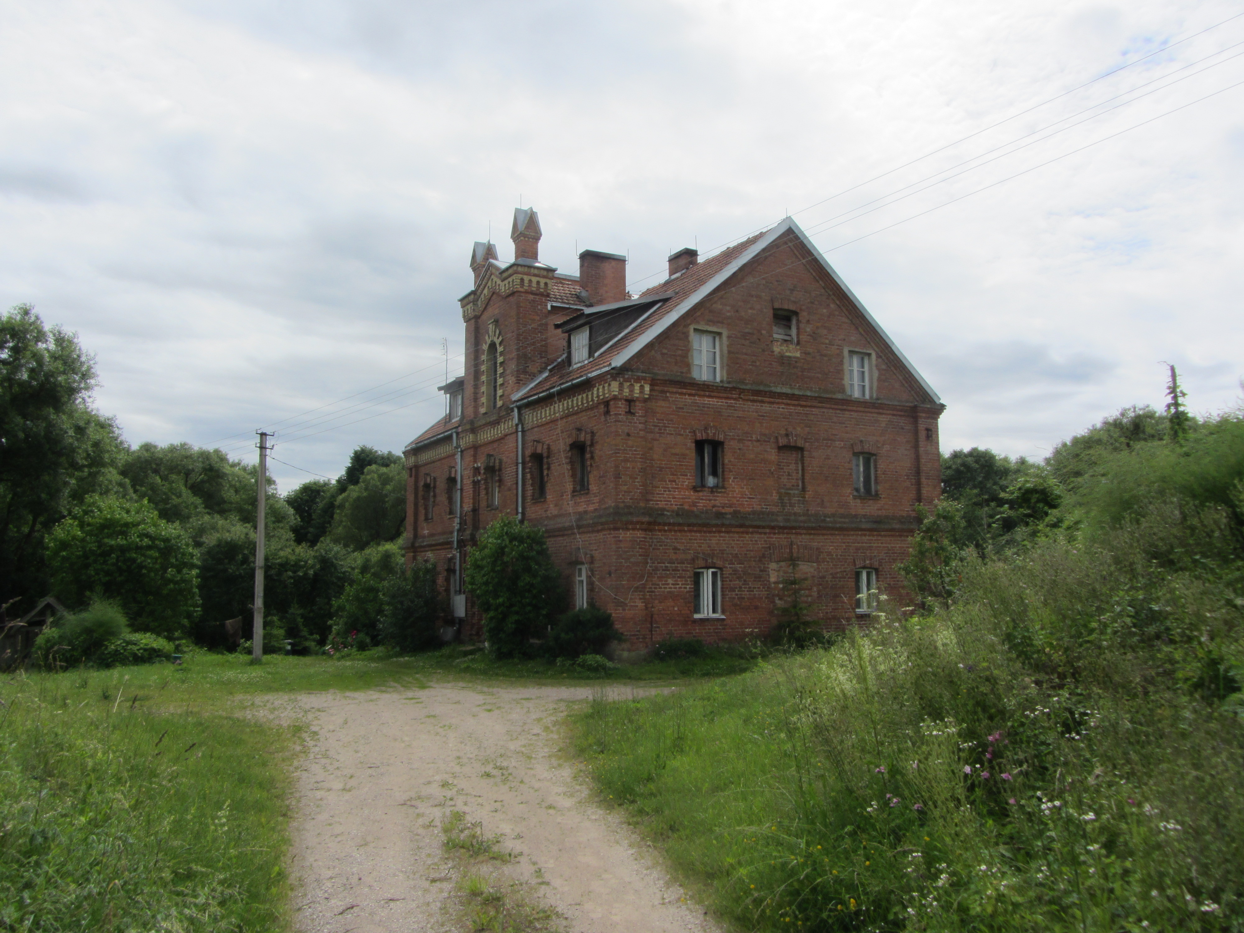 Bartkuškis 19159, Lithuania